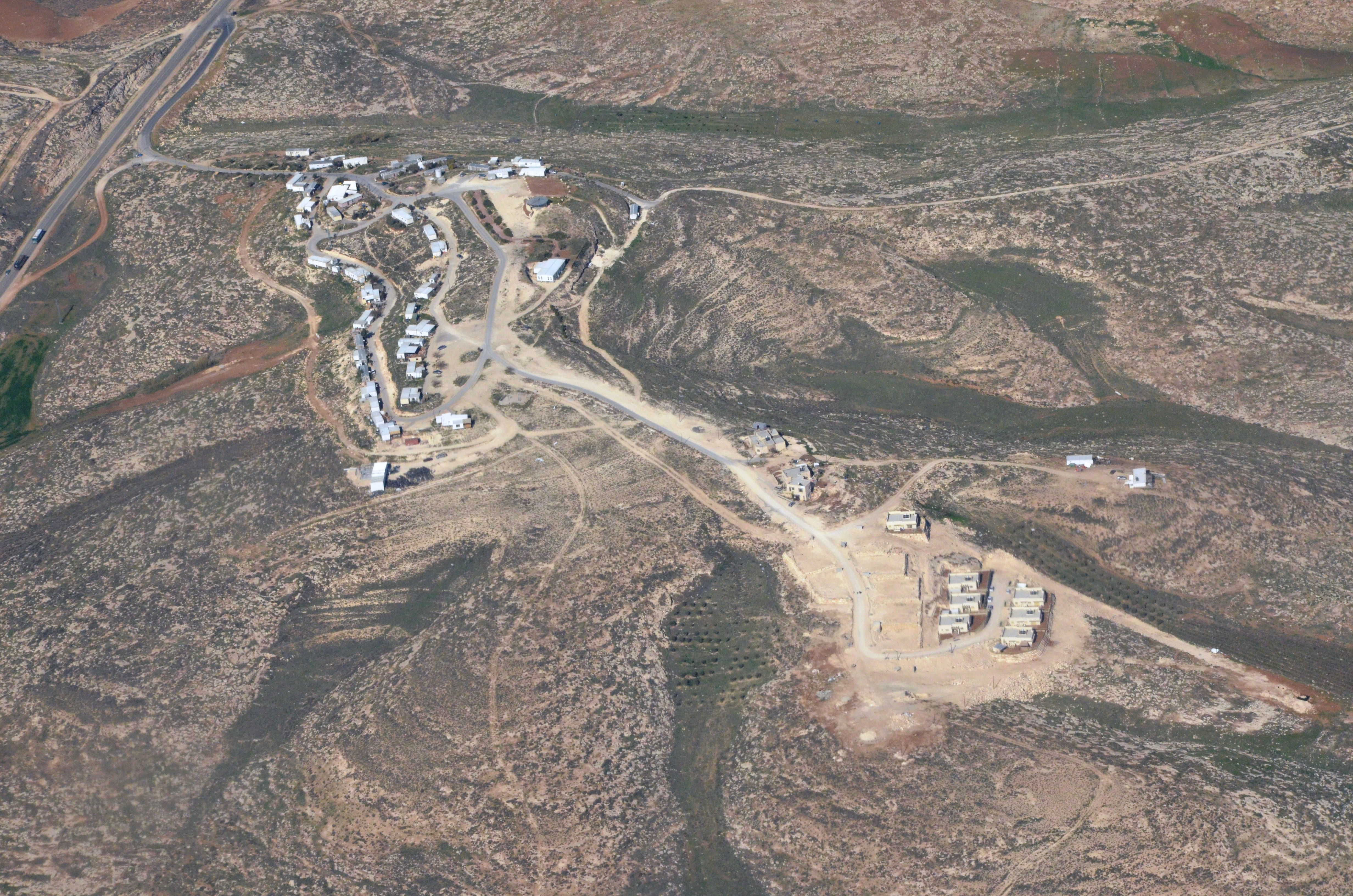 מצפה דני